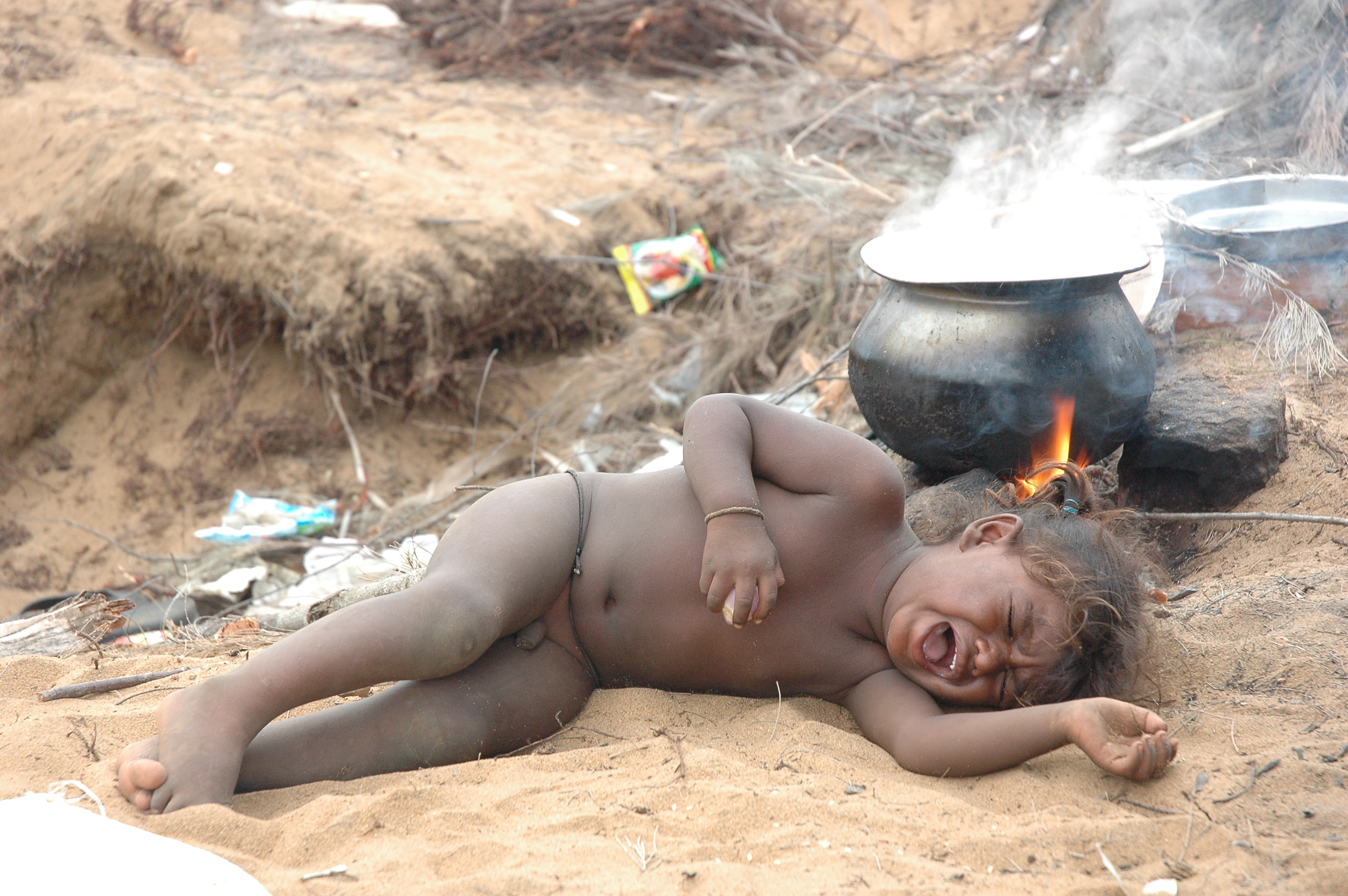 Its taken at mahaballipuram via chennai